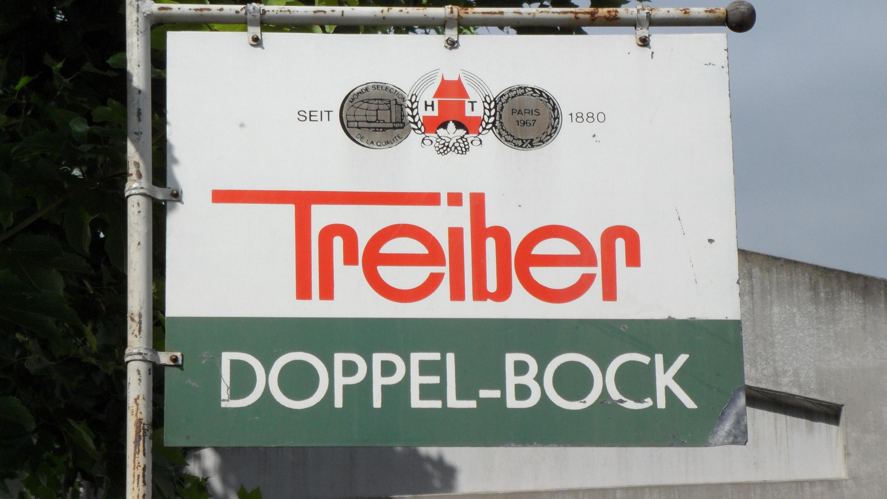 aufgenommen an der Gaststätte Zur alten Turnhalle